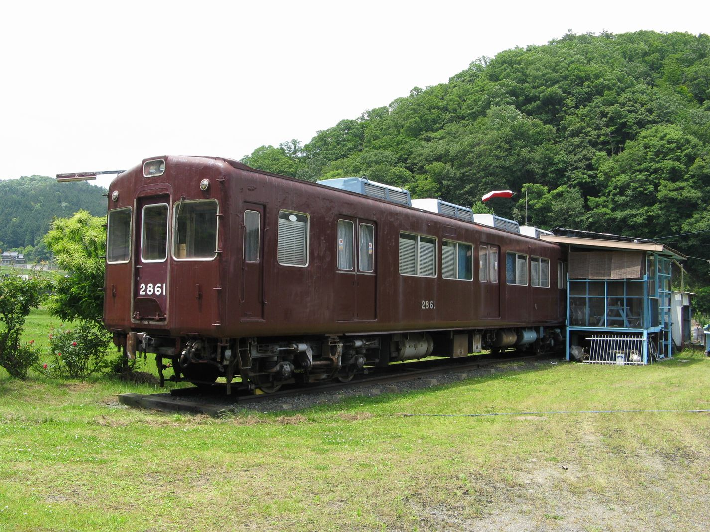 京都府福知山市雲原の民有地に置かれた阪急2800系電車2861号（国道176号上から撮影）